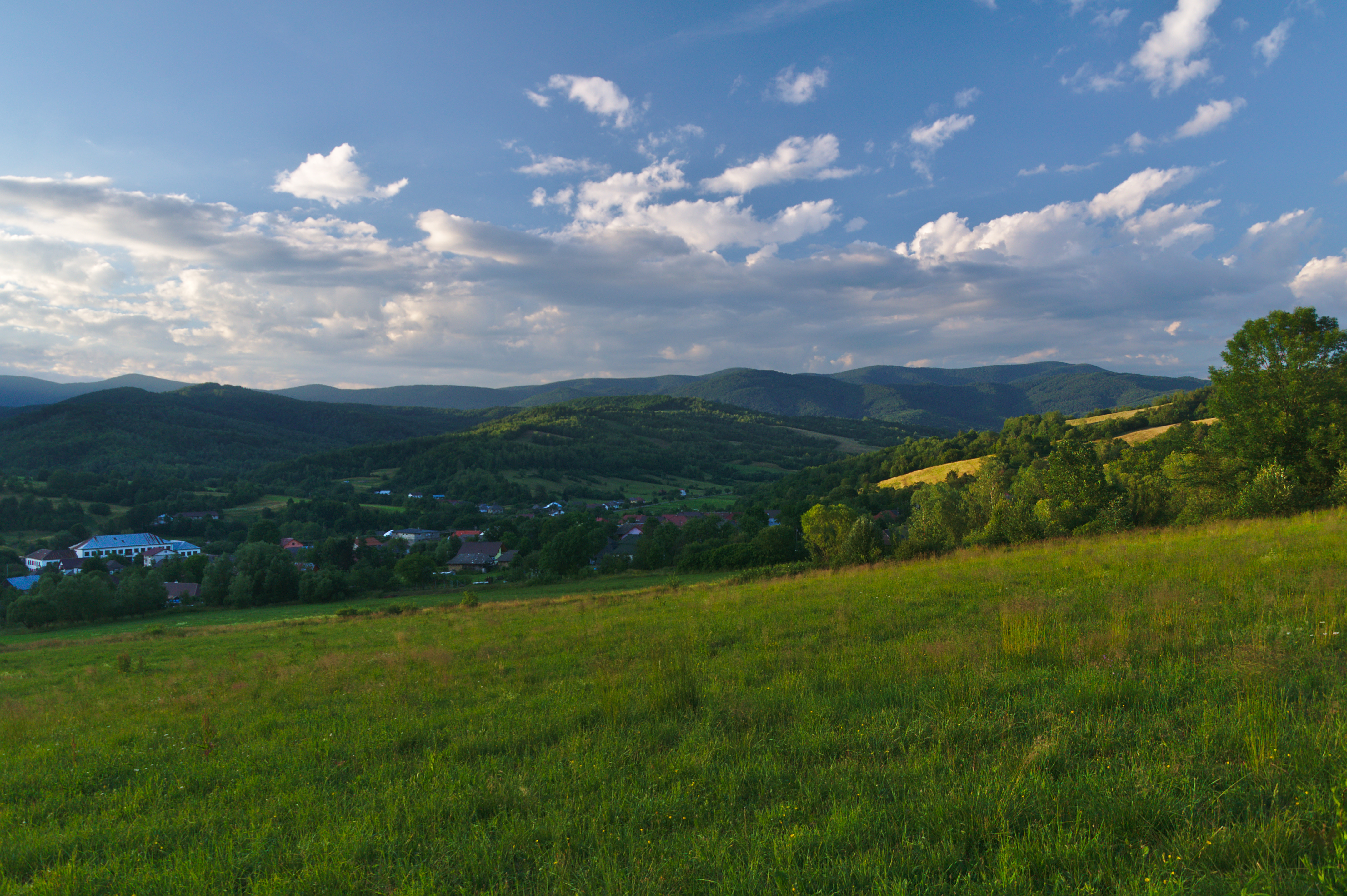 Pohľad na dedinu, Zboj, okres Snina